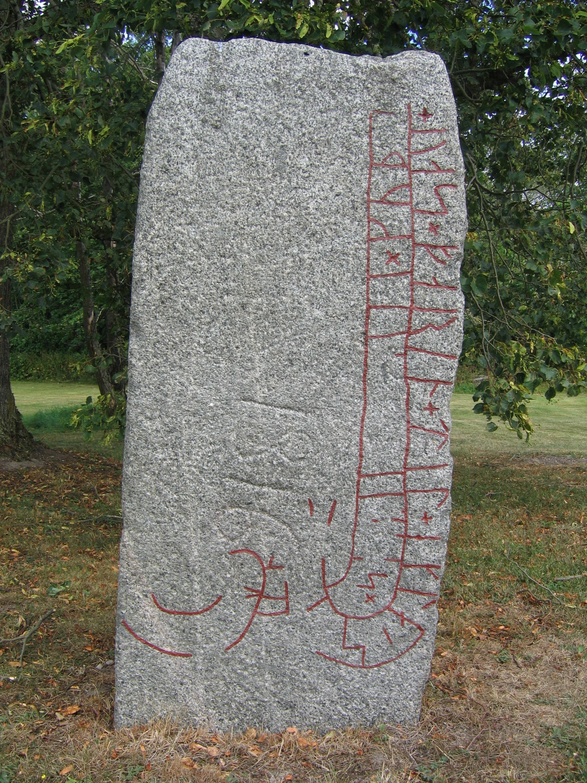 Runestone Vs 5 in Vändle, Västerås.